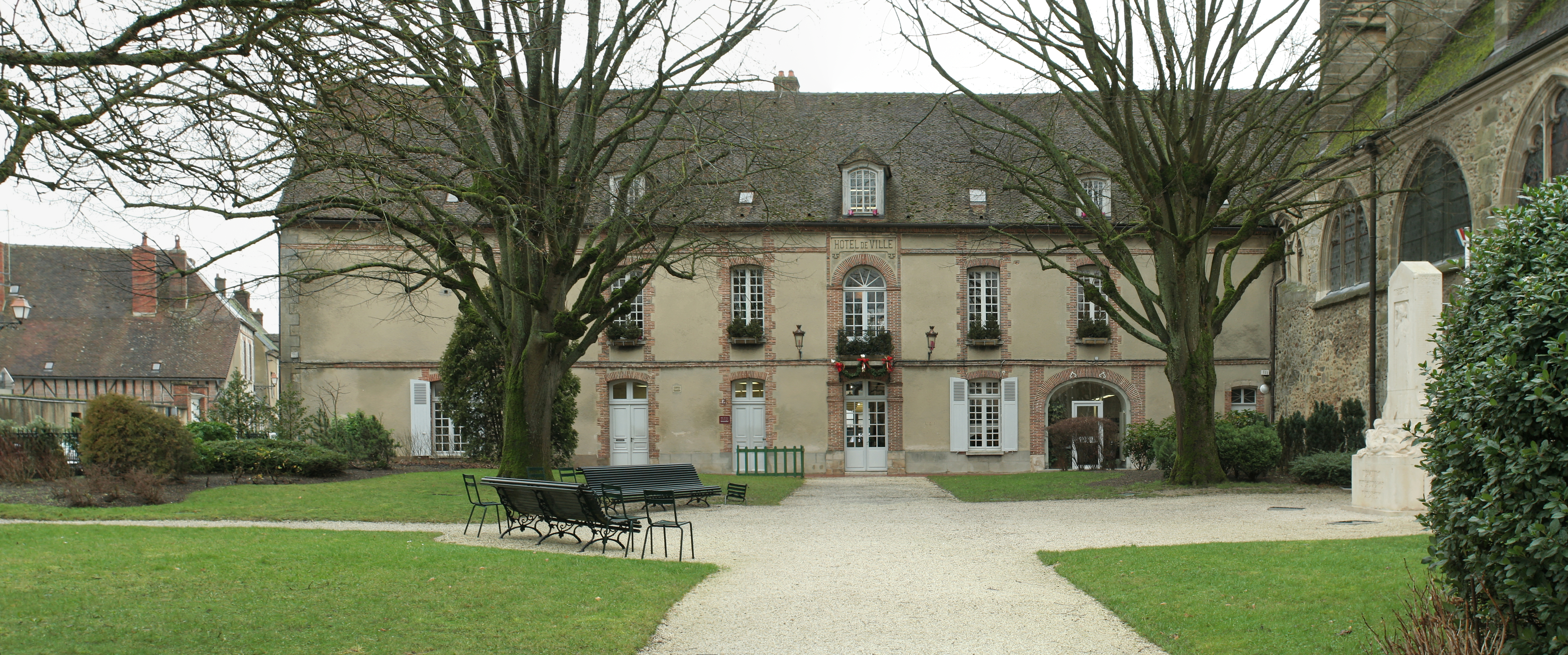 Hôtel de ville de Sézanne (Marne). Vue d'ensemble de la façade.